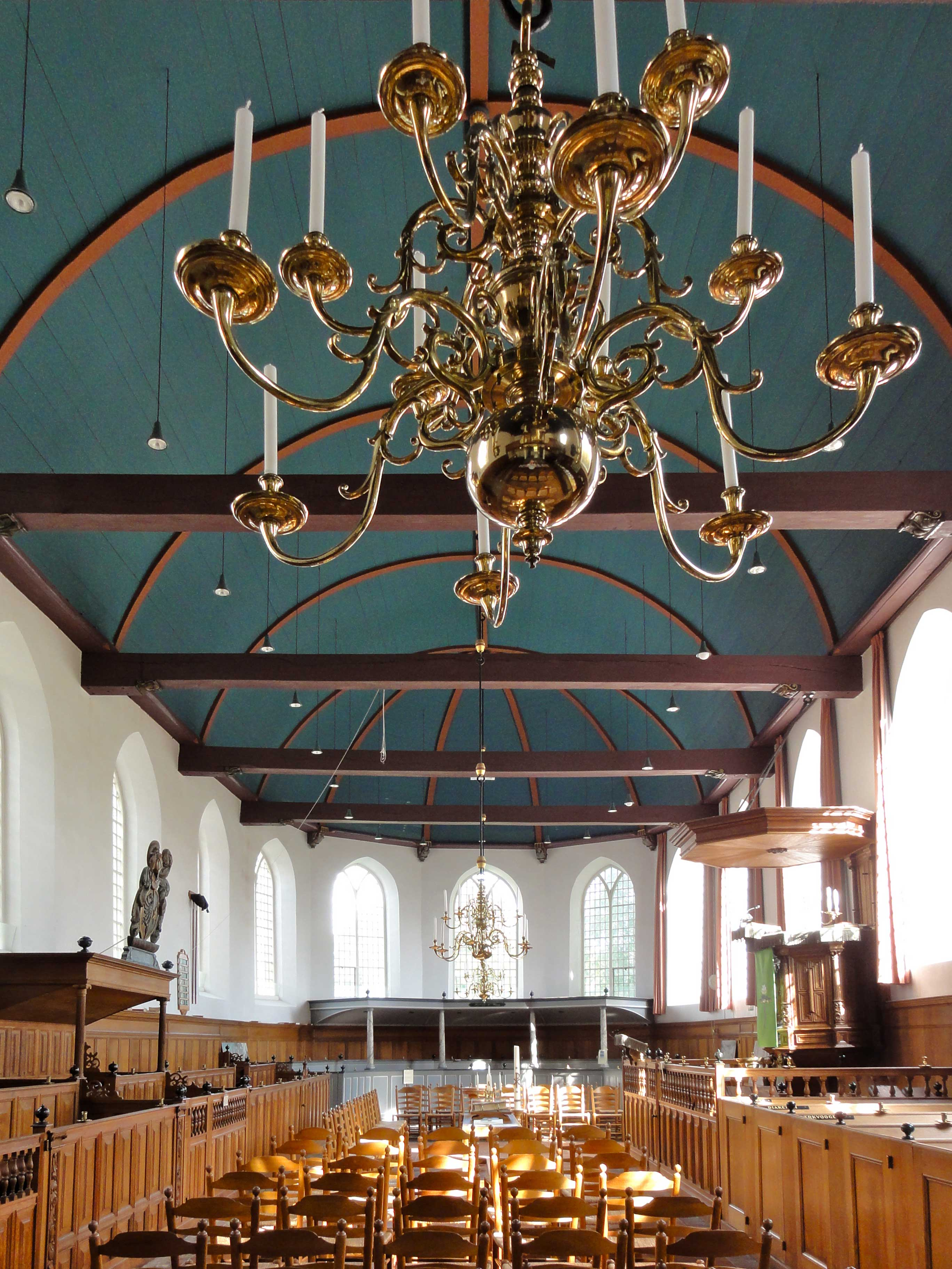 Interieur Hervormde Kerk aan de Heerenwal 52 te Sloten